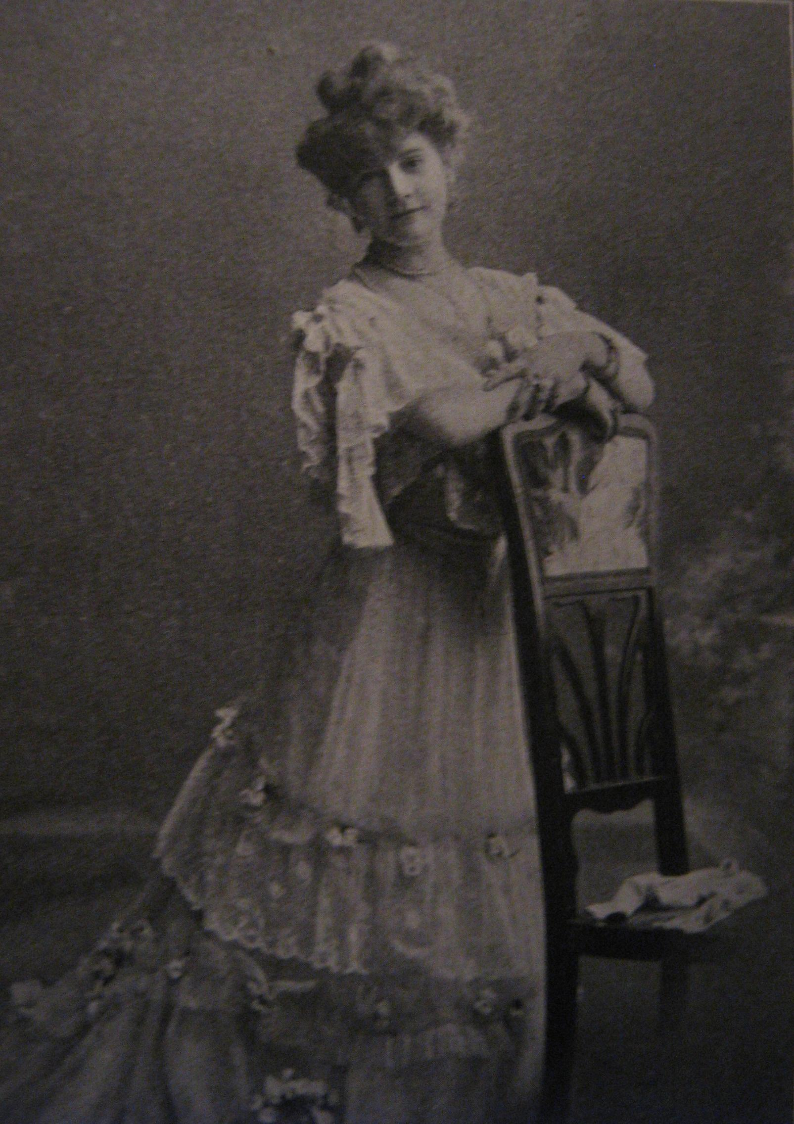 Fotografi av Charlotte Wiehe Bereny